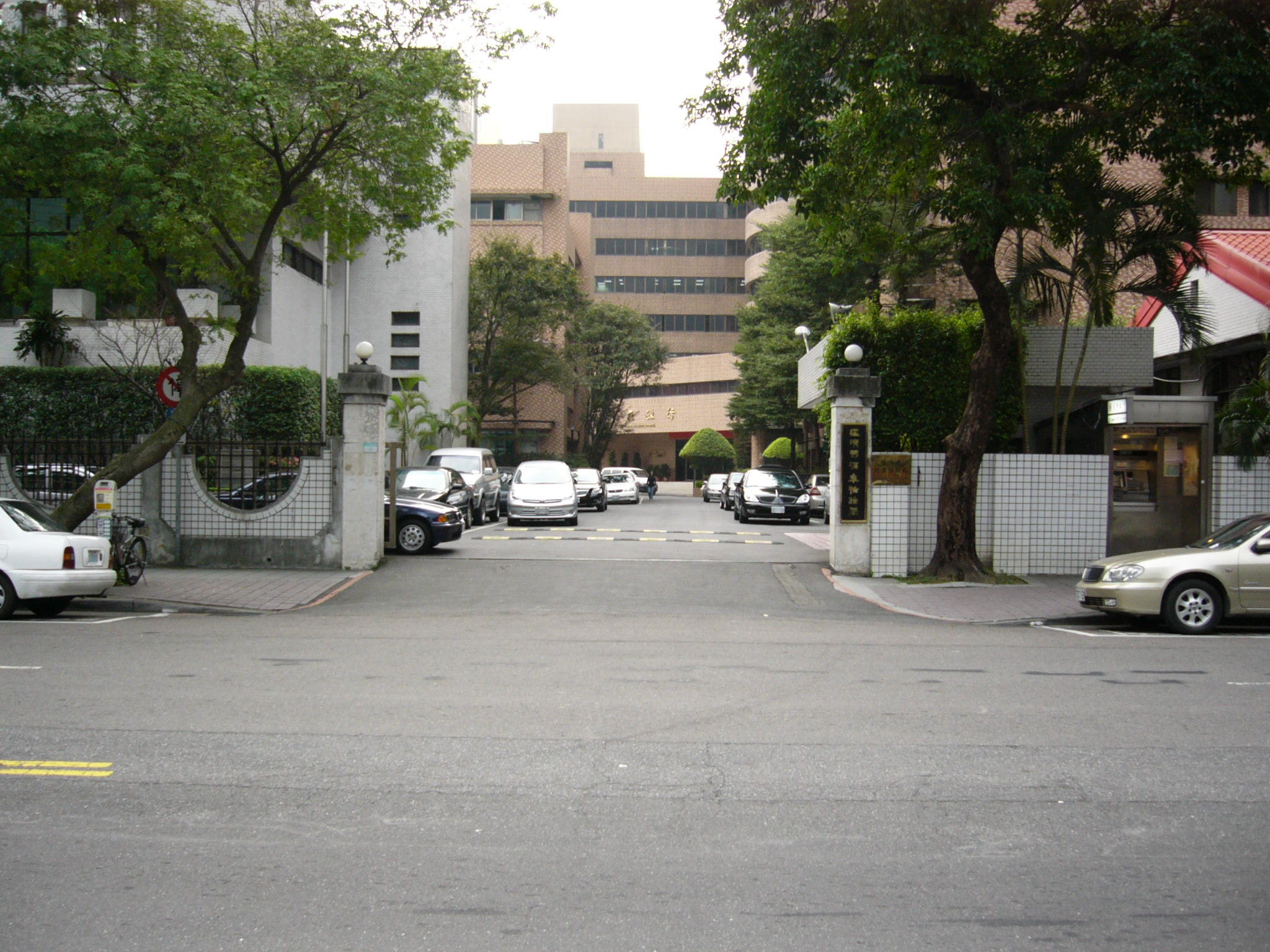 中華民國經濟部標準檢驗局總局，位於臺北市中正區濟南路一段4號。